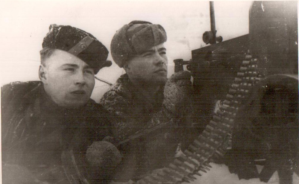 Бои 6-ой ЛПБ